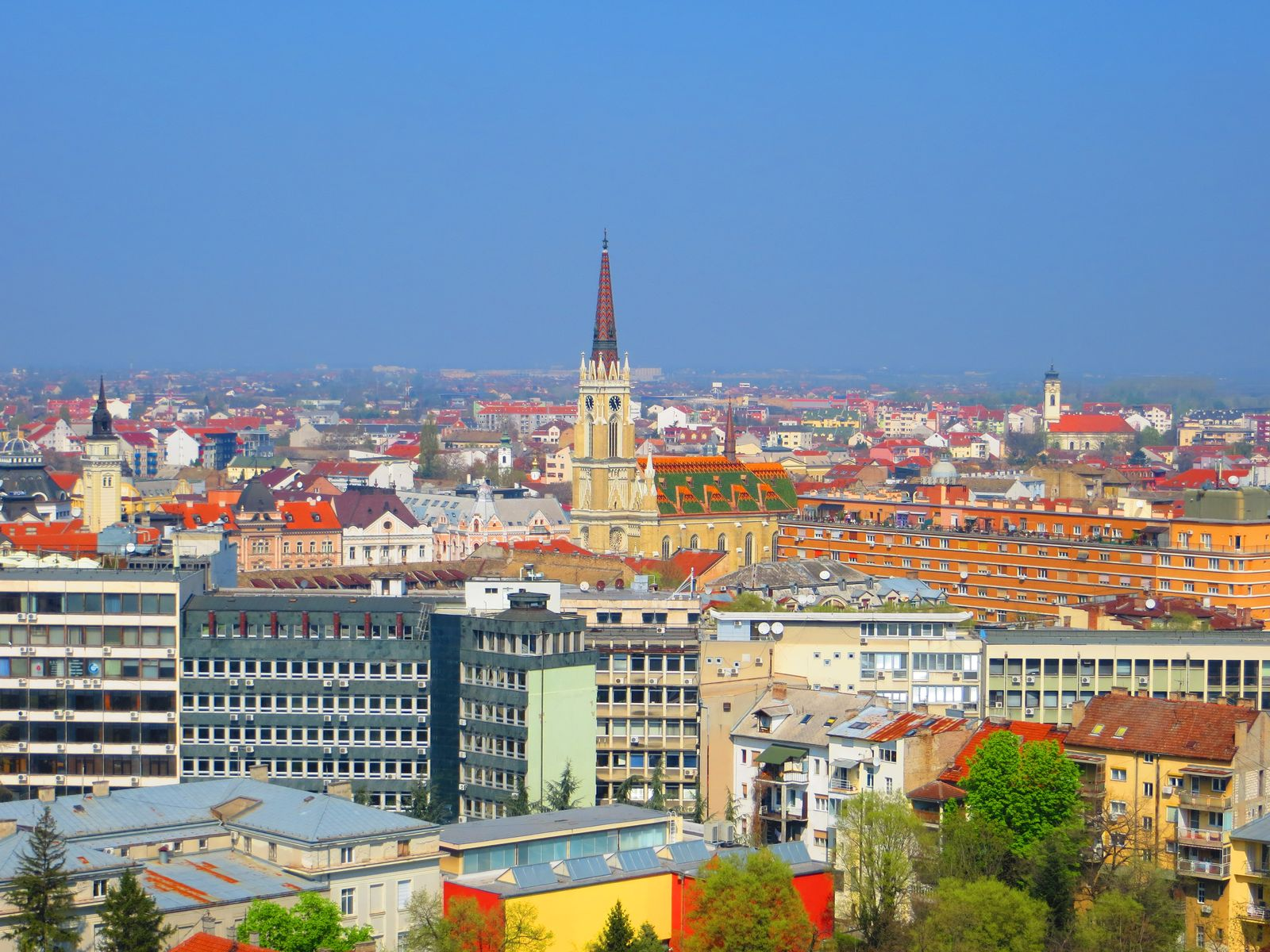 Panorama Novovg Sada sa zgrade Radničkog Univerziteta